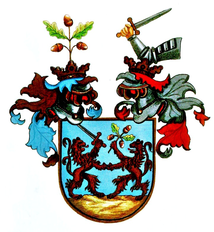 Armoiries de la famille hongroise Lónyay de Nagy Lónya et Vásáros-Namény (nagylónyai és vásáros-naményi Lónyay)